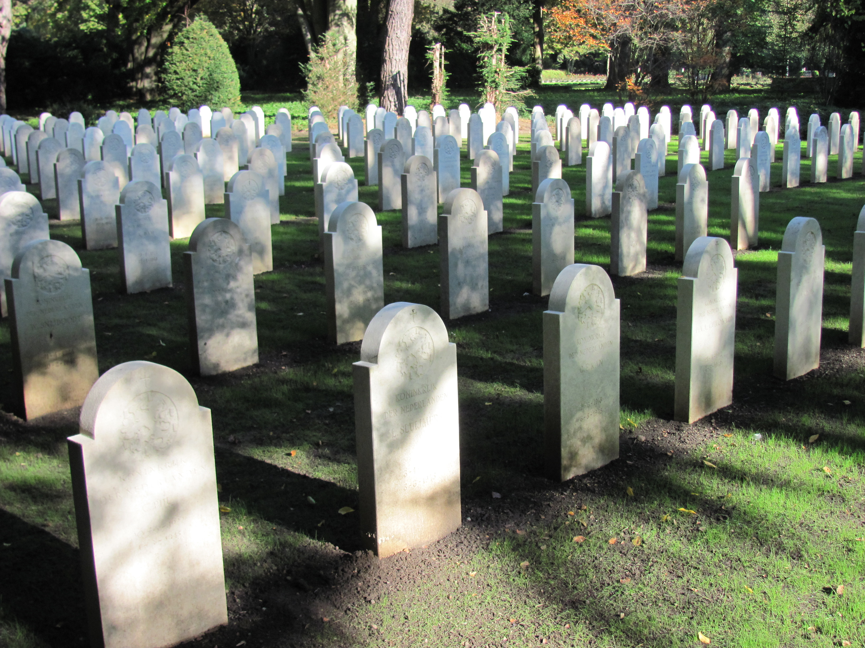 Grabsteine auf dem Niederländischen Ehrenfeld auf dem Friedhof Ohlsdorf